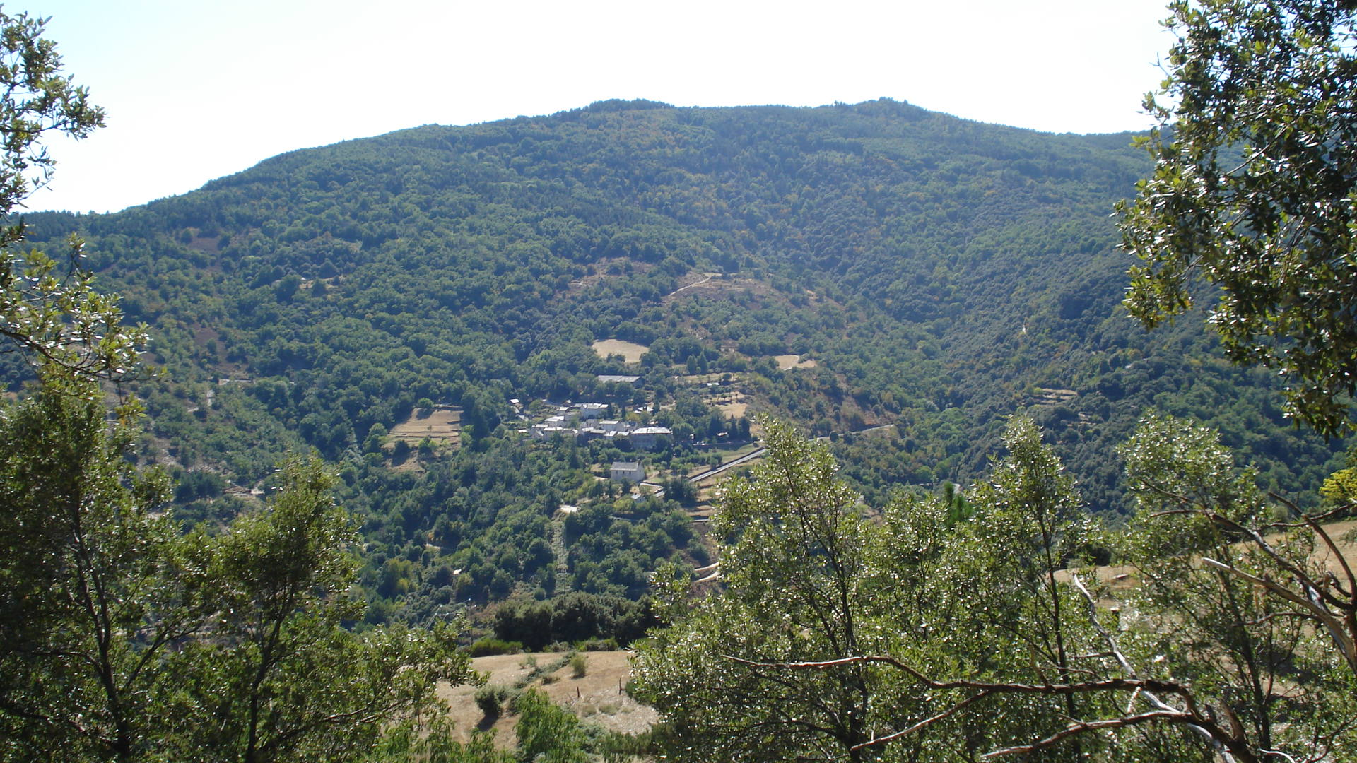 Vue générale du village de Saint-Martin-de-Lansuscle depuis l'Est (RD13)